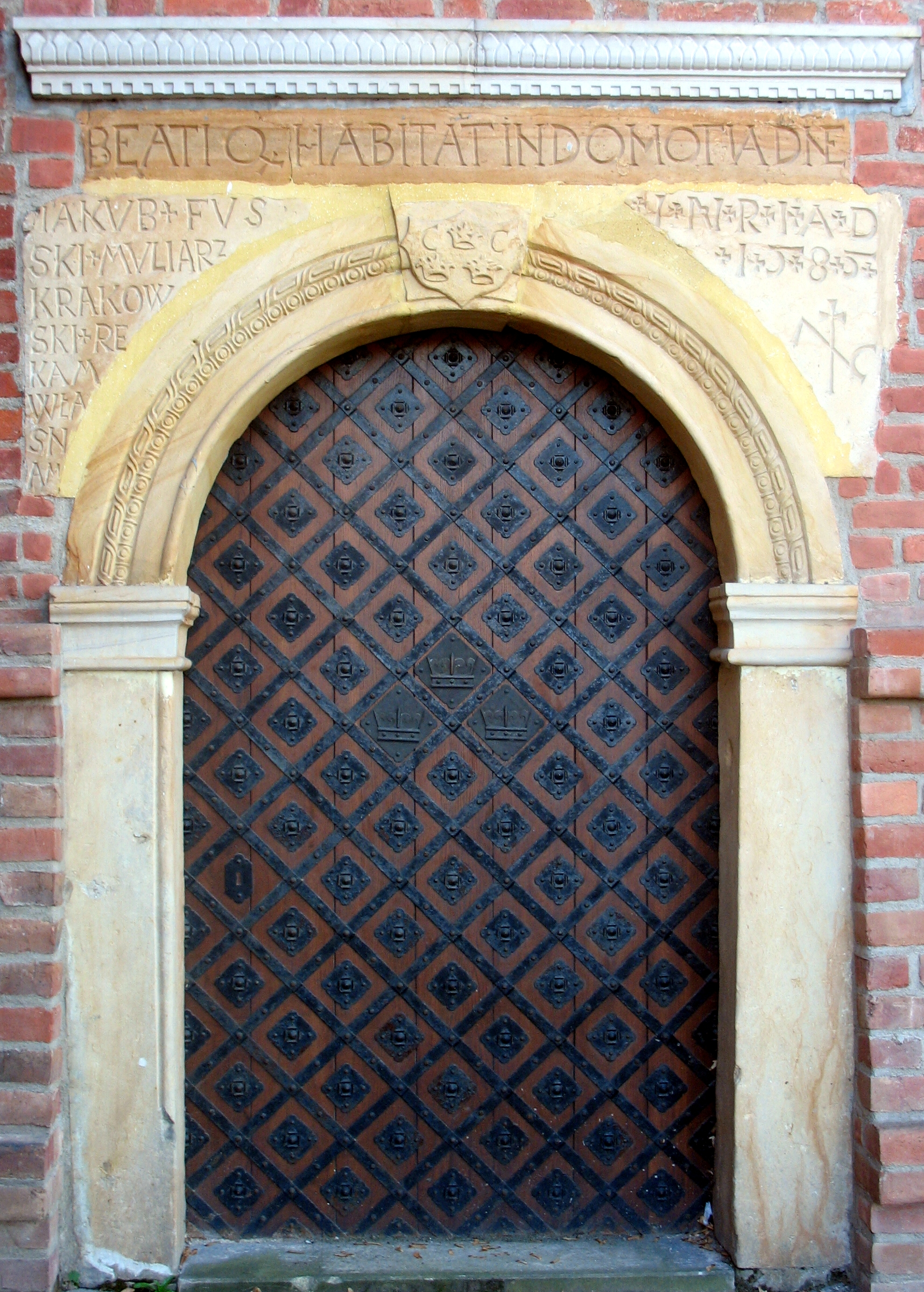 Portal północny kościoła św. Mateusza w Pabianicach